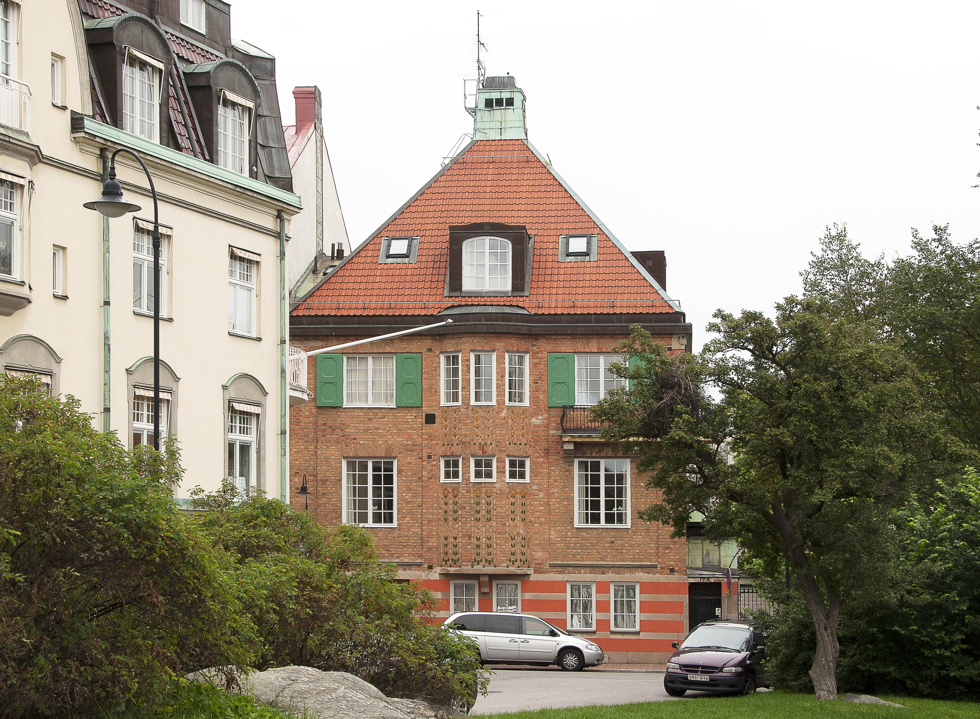 Från vänster: Baldersgatan 1/Friggagatan 2 (Sånglärkan 10): Byggnadsår 1909-10, arkitekt och byggmästare E Lindqvist, byggherre P U Bergström. Baldersgatan 4 (Piplärkan 2): Byggnadsår 1909-10, arkitekt E Lallerstedt, byggherre W Böker, byggmästare F Dahl.